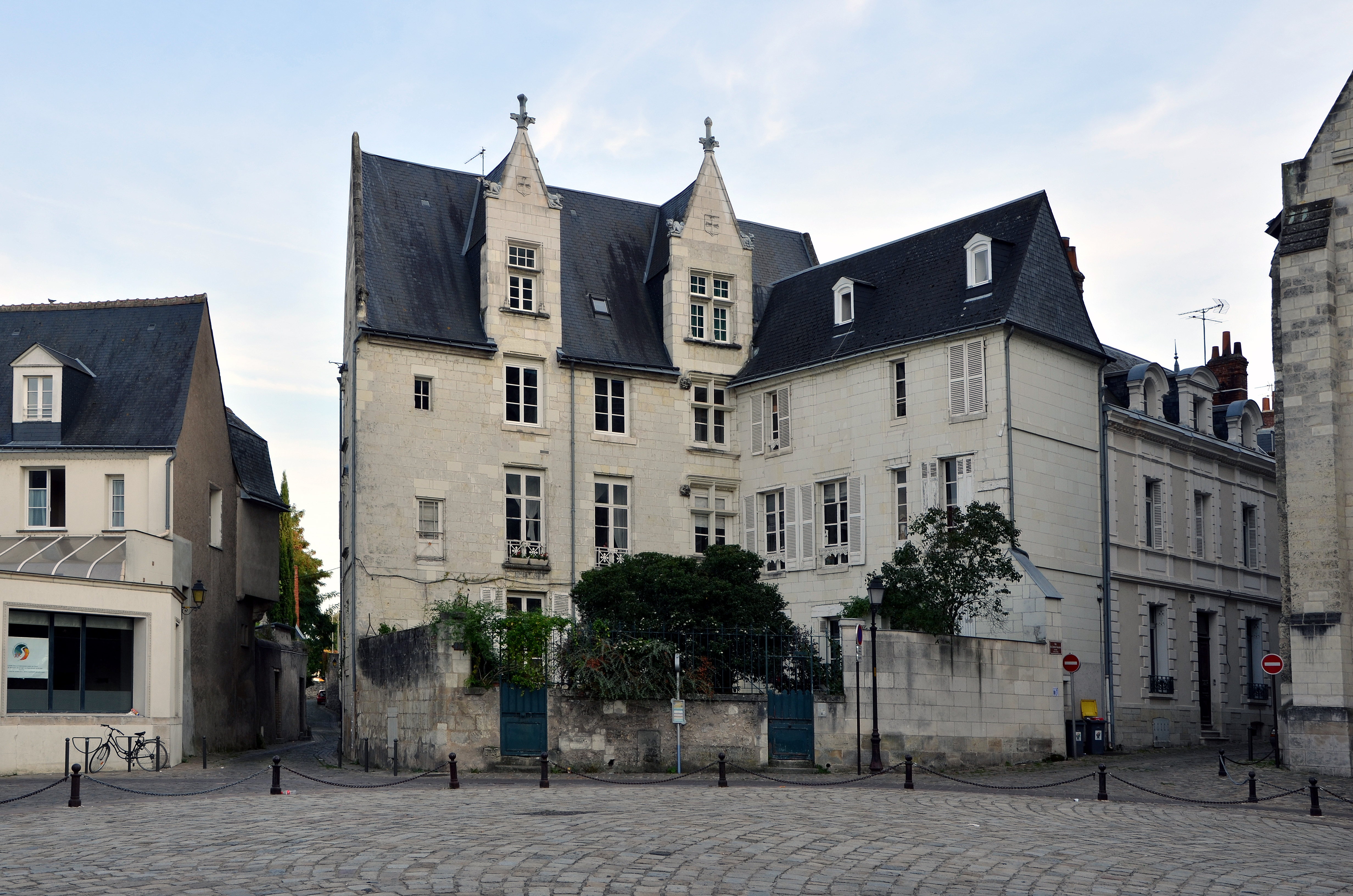 Maison canoniale du 15 ème siècle située 1 place Gregoire de Tours a Tours (Indre et Loire, France). .